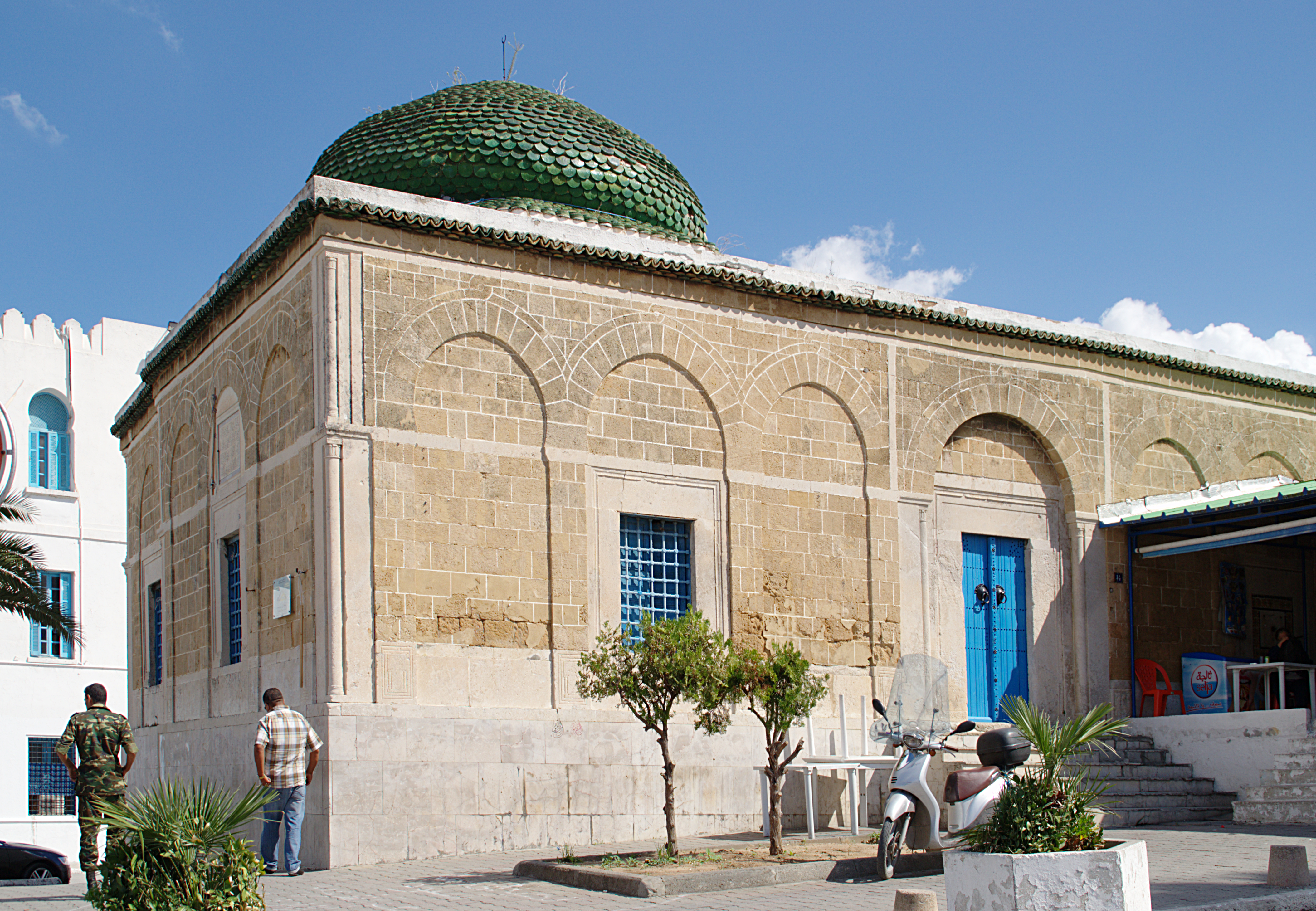 Tourbet Laz, Tunis